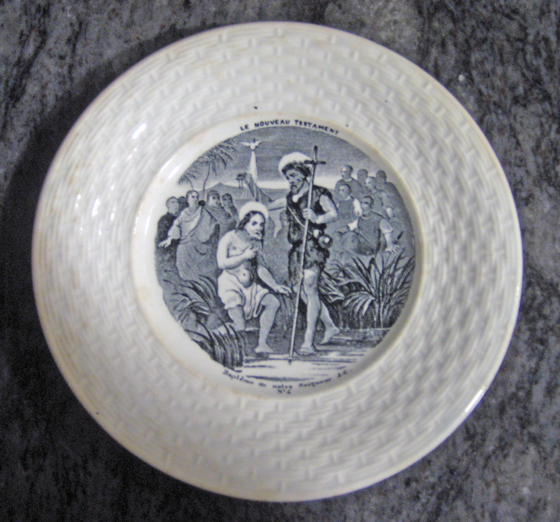 Plato de porcelana de Gien (Francia) de la serie Le Nouveau Testament Final del siglo XIX o principio del siglo XX